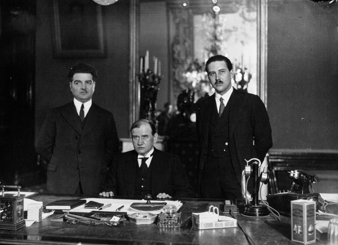 Édouard Daladier à son bureau avec deux collaborateurs, son chef de cabinet M. Clapié à gauche et M. Guy La Chambre, sous-secrétaire d'Etat à la Présidence du Conseil, photographie, négatif sur verre ; 13 x 18 cm (sup.) ou moins.